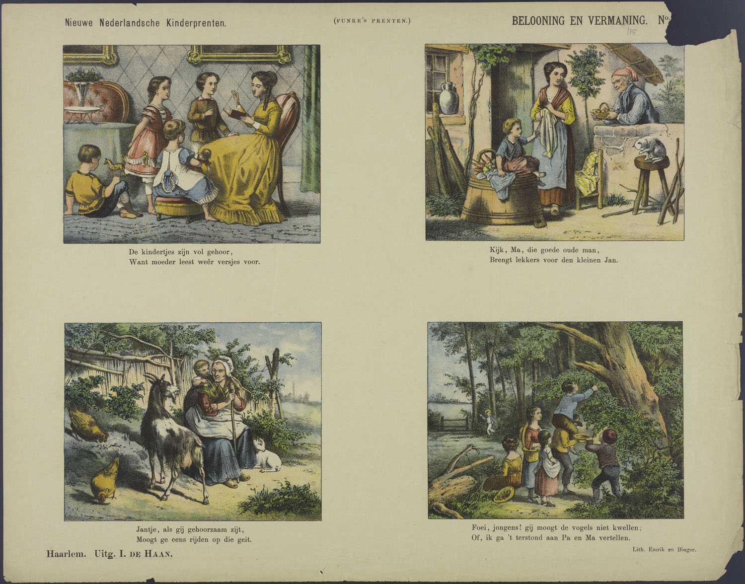 Oblong centsprent met een chromolitho met 2 x 2 afbeeldingen van een moeder die haar kinderen versjes voorleest, een oude man brengt een mandje met vruchten voor een kleine jongen, oude vrouw met klein kind en geit, kinderen staande bij een boom, bezig vogels te plagen. Bevat tweeregelige rijmende onderschriften